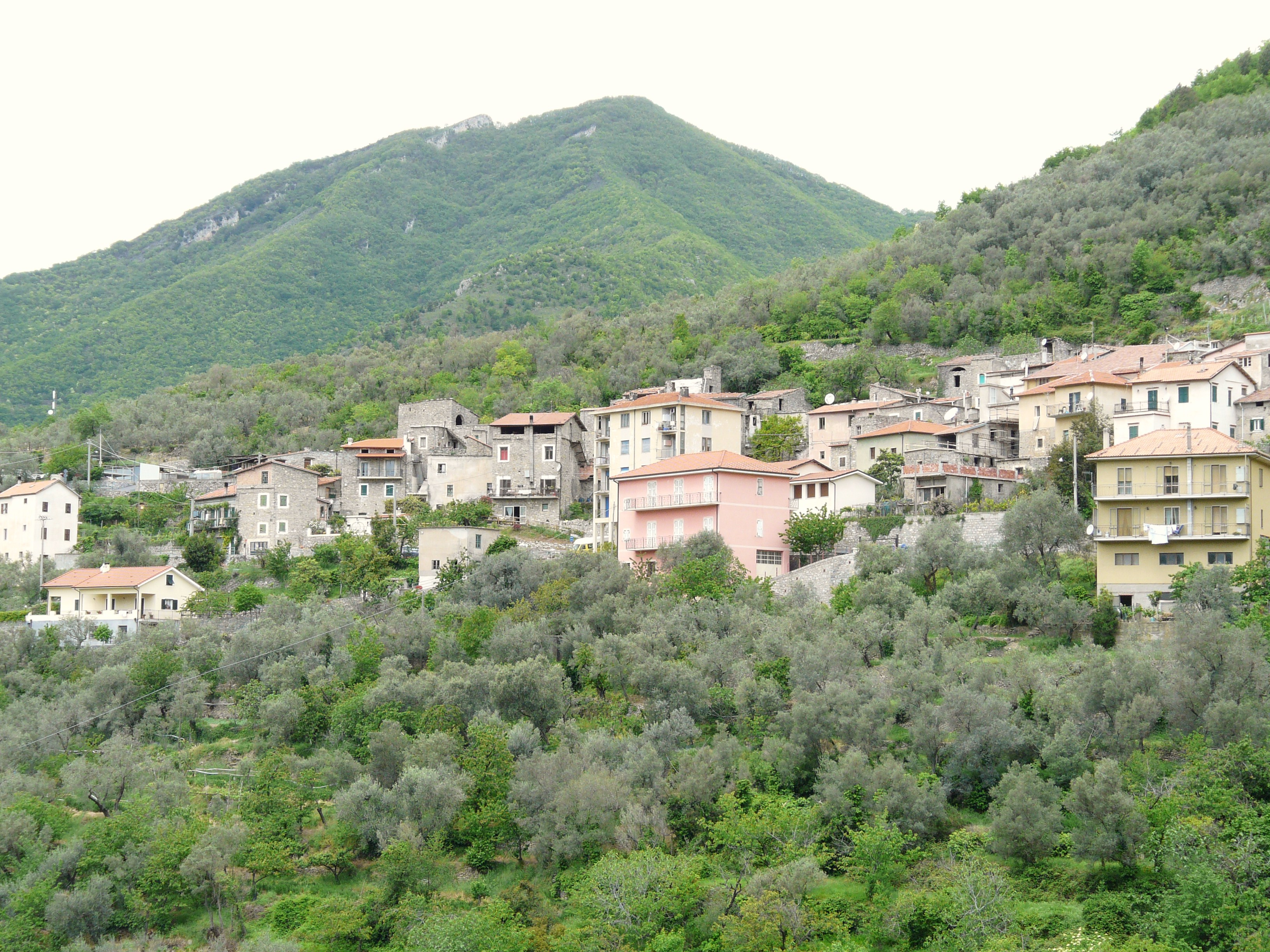 Panorama del Comune di Castelbianco, Liguria, Italia